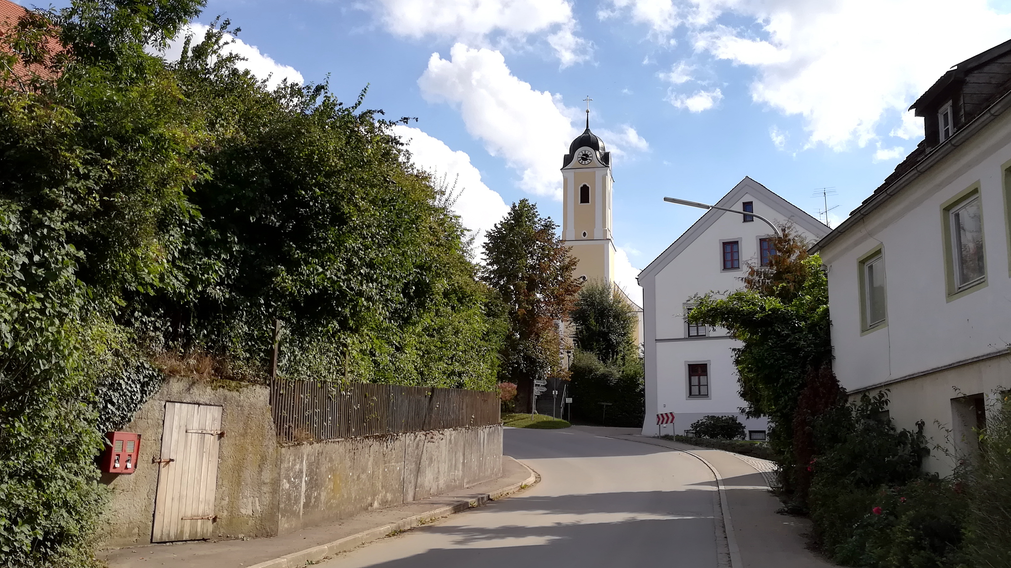 Katholische Pfarrkirche St. Nikolaus in Attenhofen